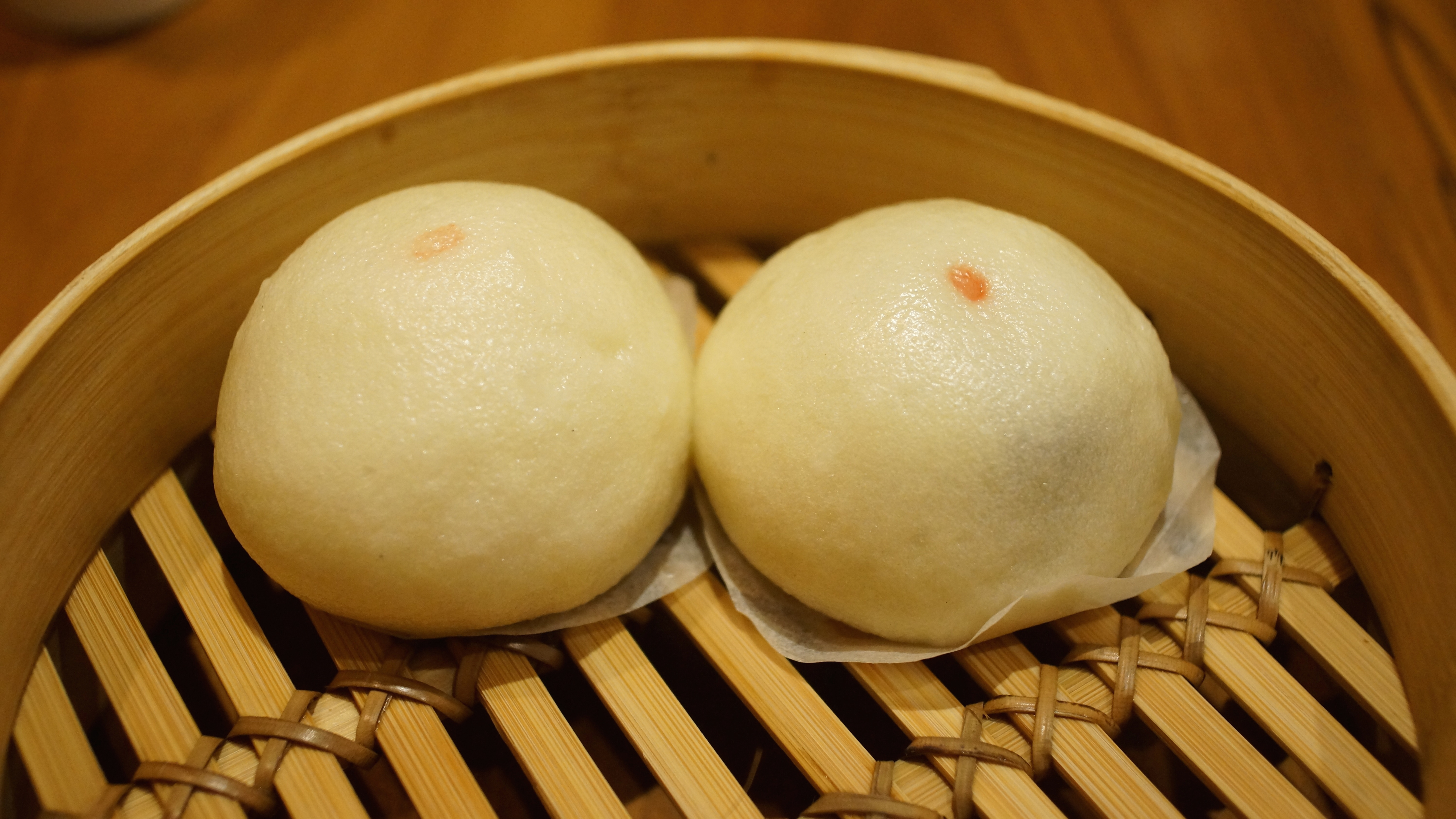 20150103_鼎泰豐_14_豆沙大包